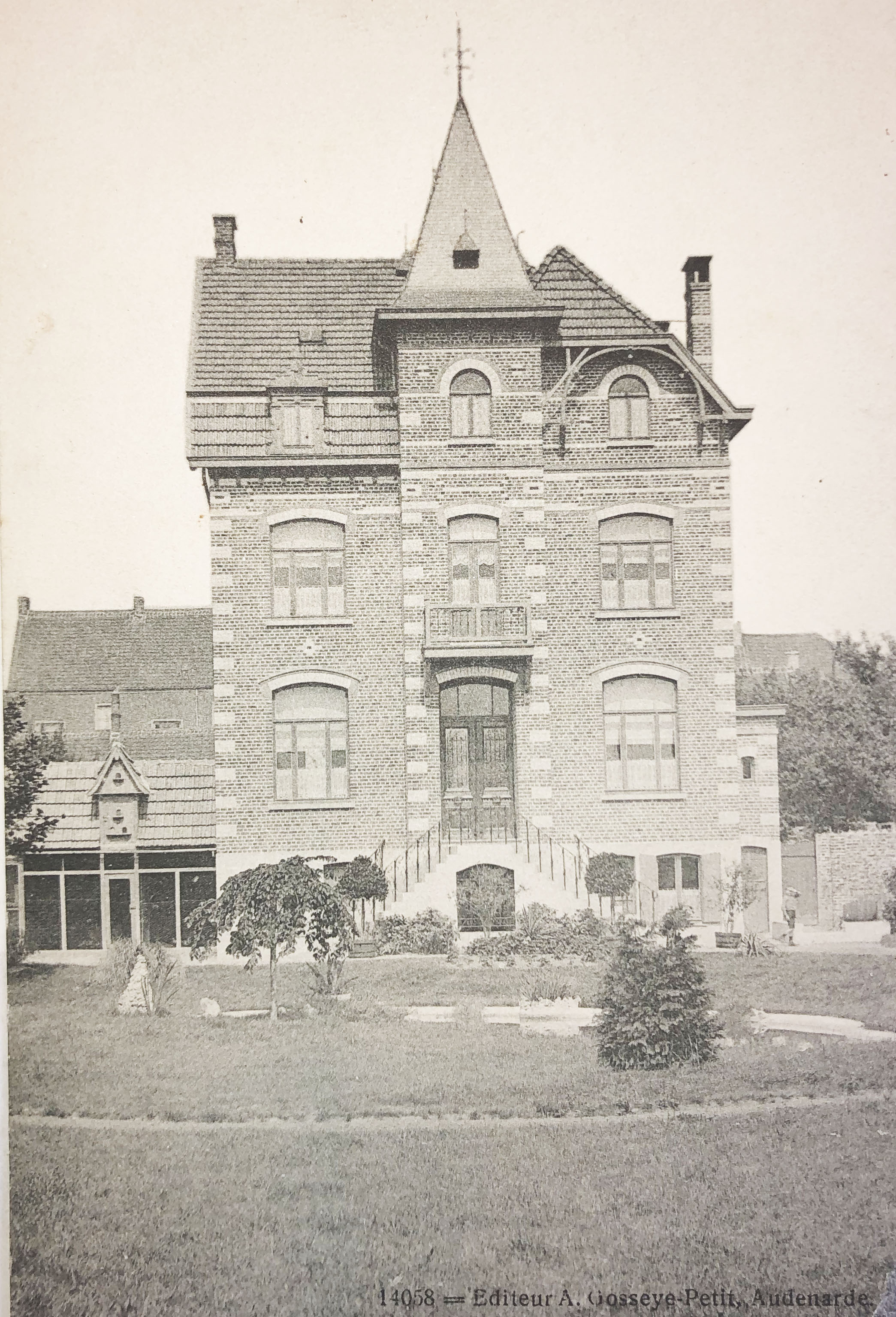 Kasteel De Varens Oudenaarde